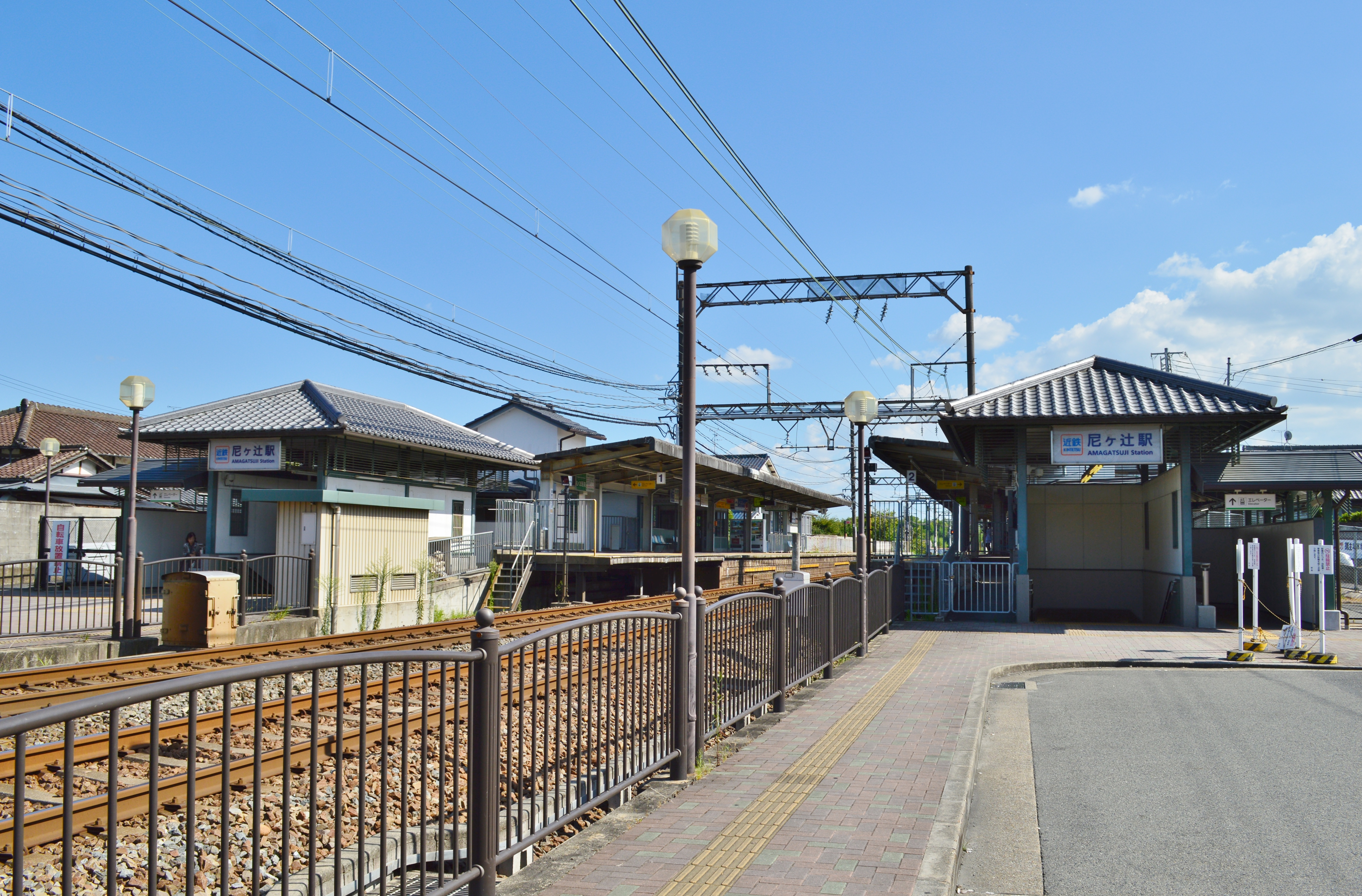 尼ヶ辻駅 全景